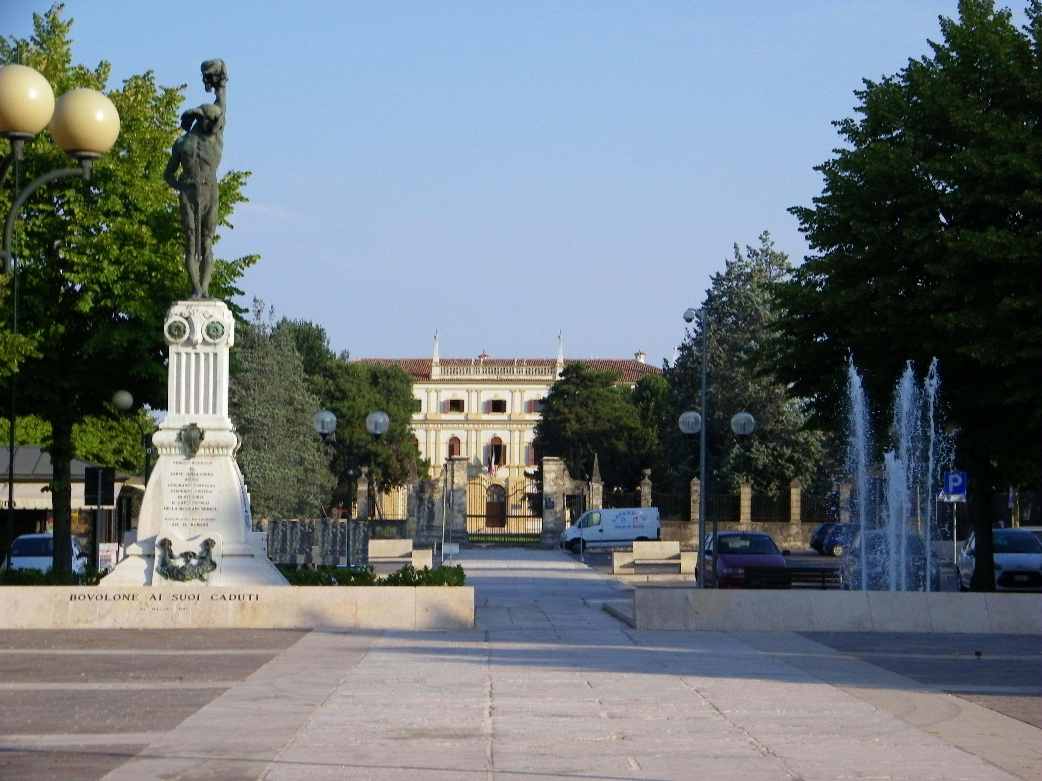 Piazza Scipione dominata dal Palazzo vescovile - Bovolone